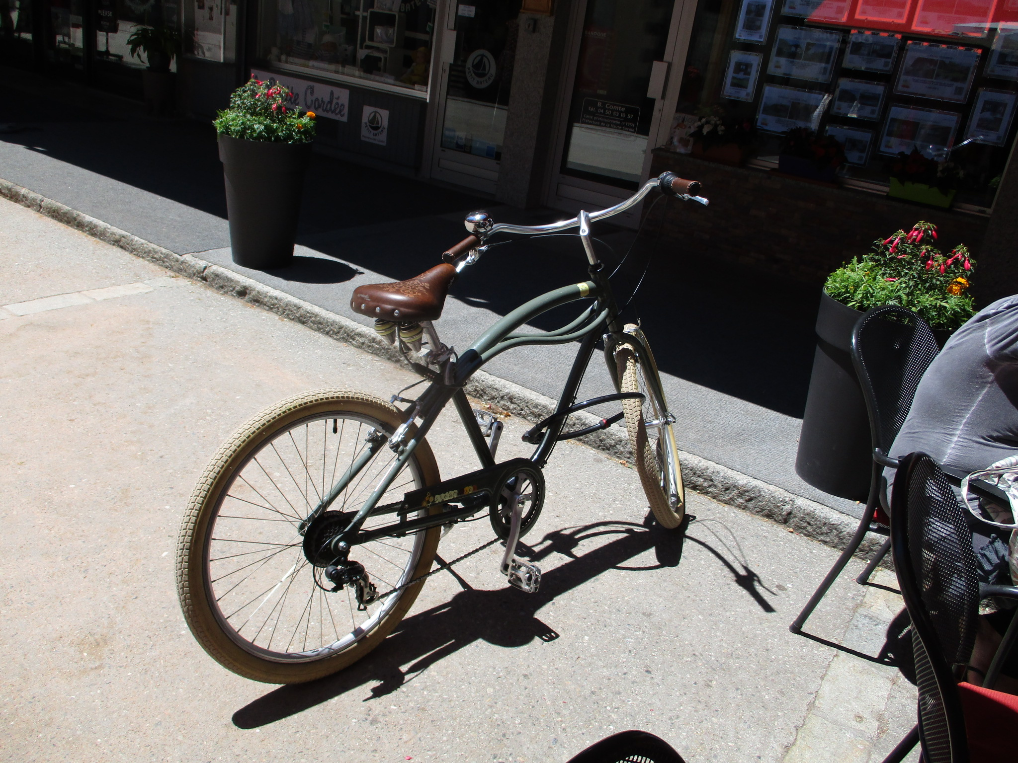 Streets in Chamonix